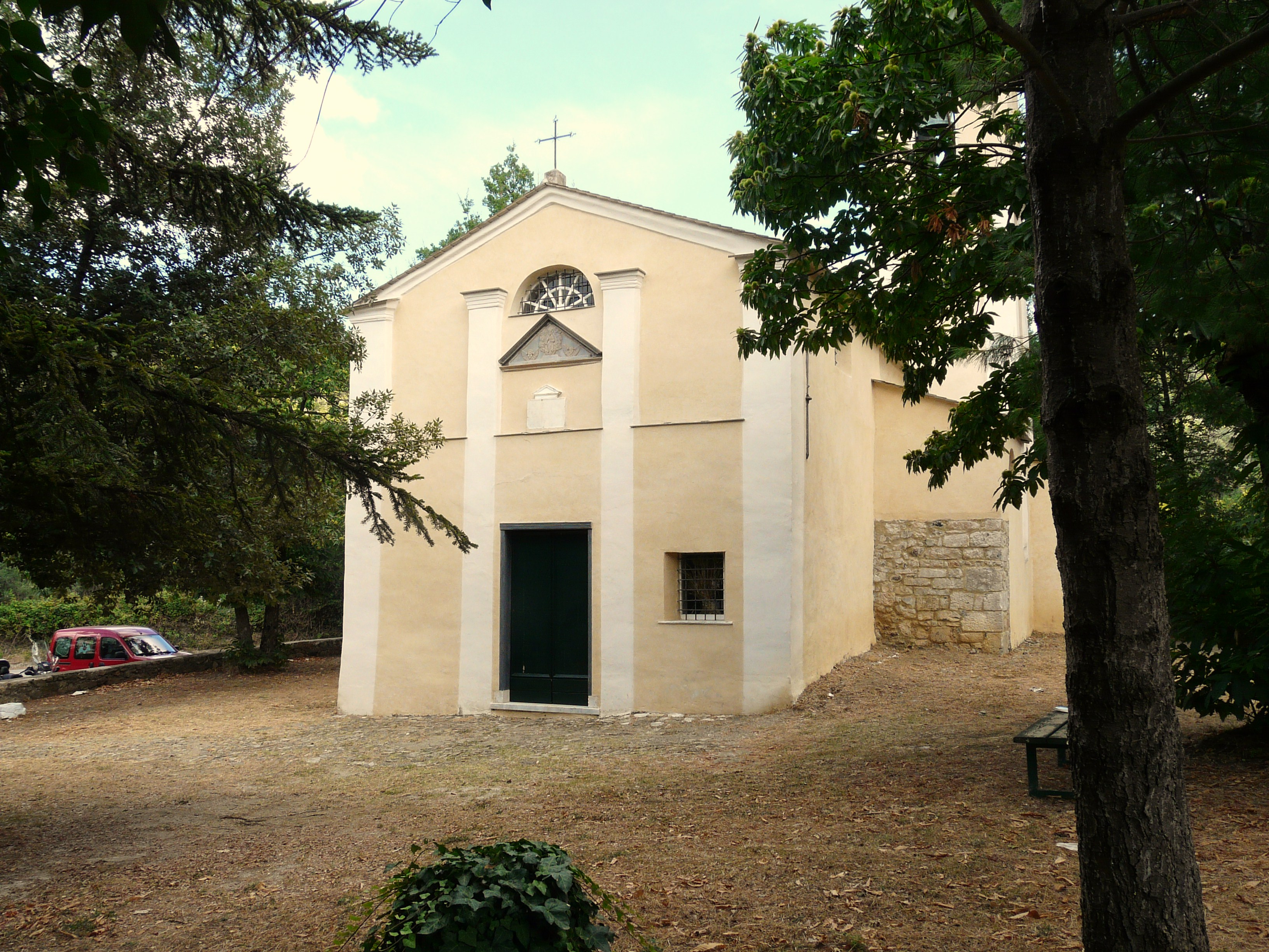 Chiesa di Passano, Deiva Marina, Liguria, Italia